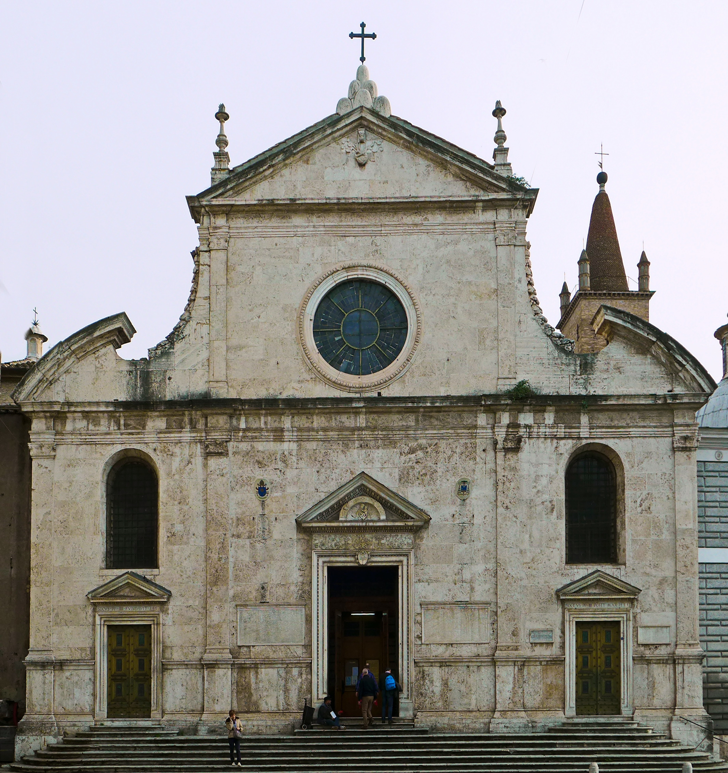 Santa Maria Del Popolo Fassade